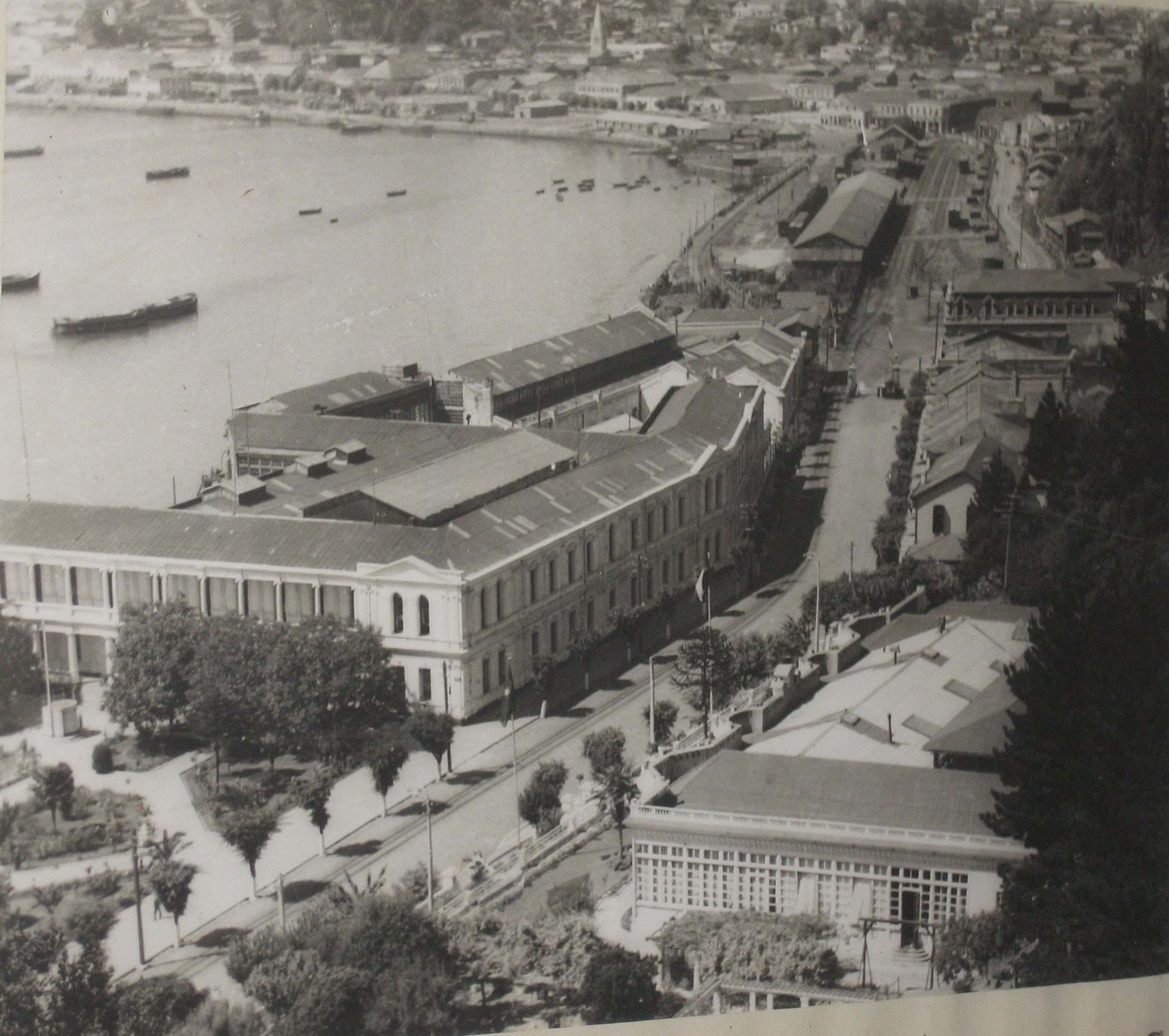 El Cuartel de Defensa de Costa, hoy Infanteria de marina, año 1935